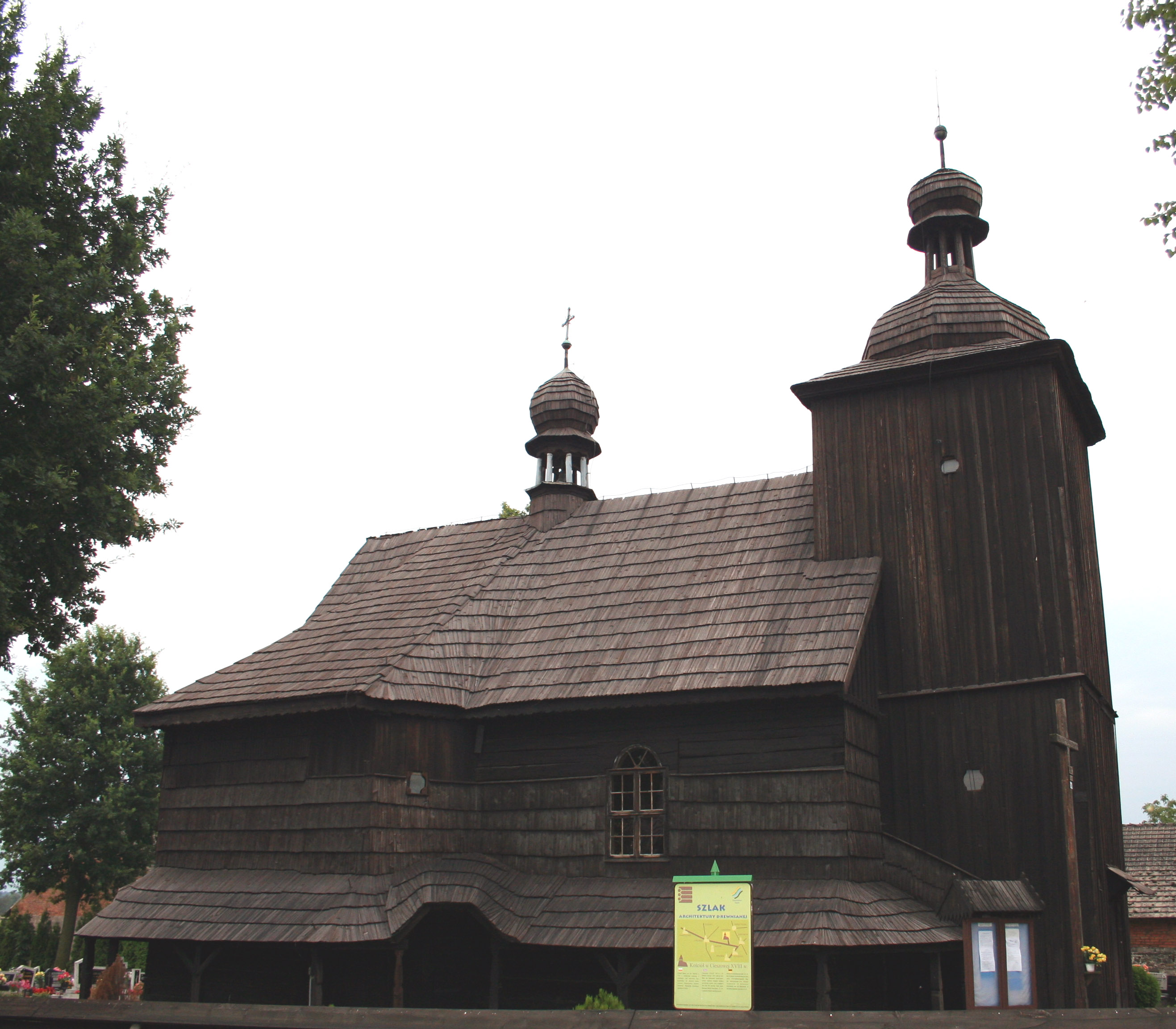 kościół św. Marcina w Cieszowej, powiat lubliniecki